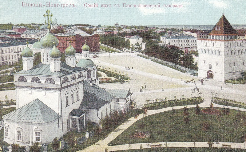 Благовещенская площадь и Нижегородский Кремль около 1896 года